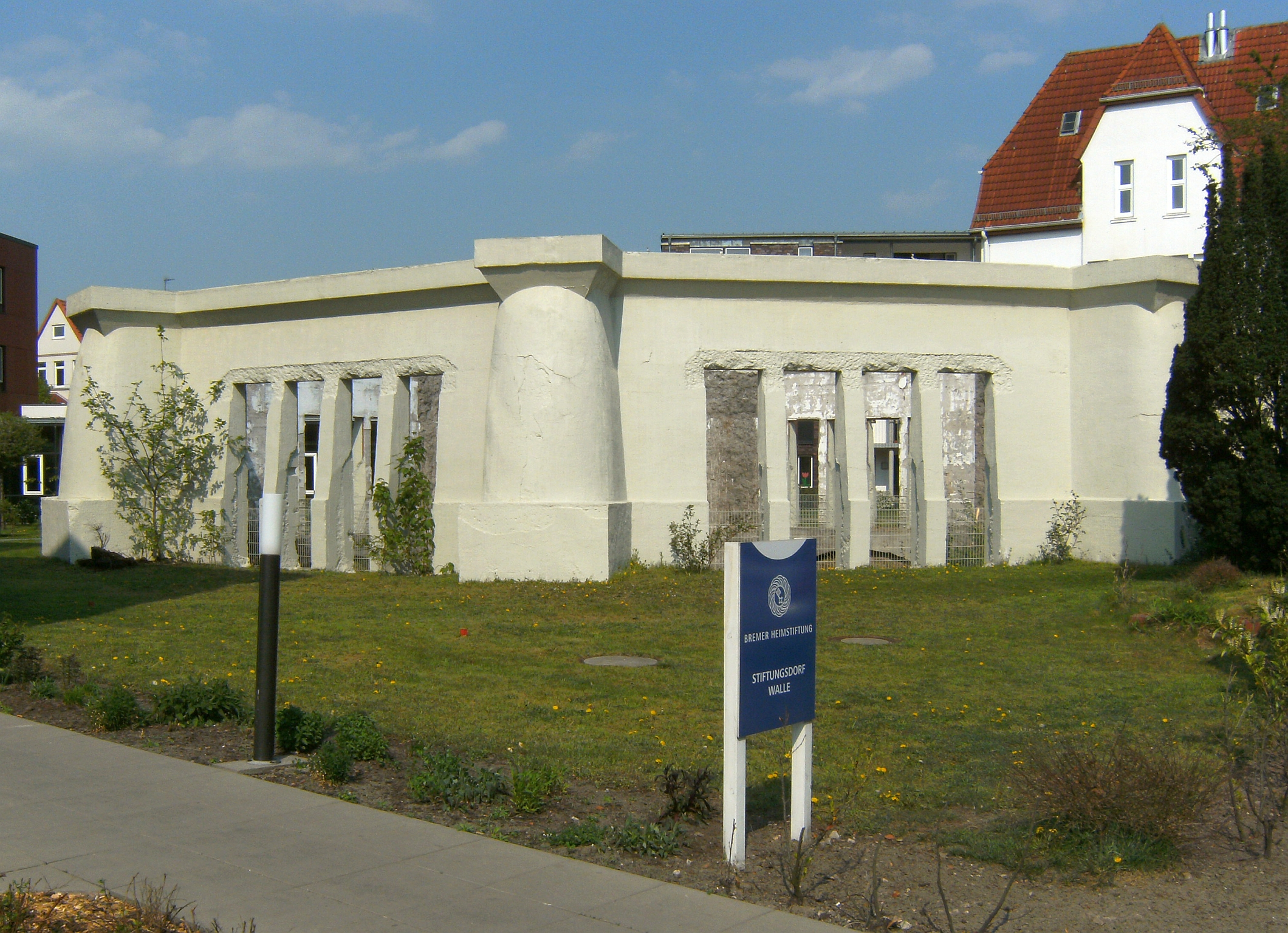 Der Sockel des 1905 errichteten und im 2.Weltkrieg zerstörten Wasserturms steht noch heute.